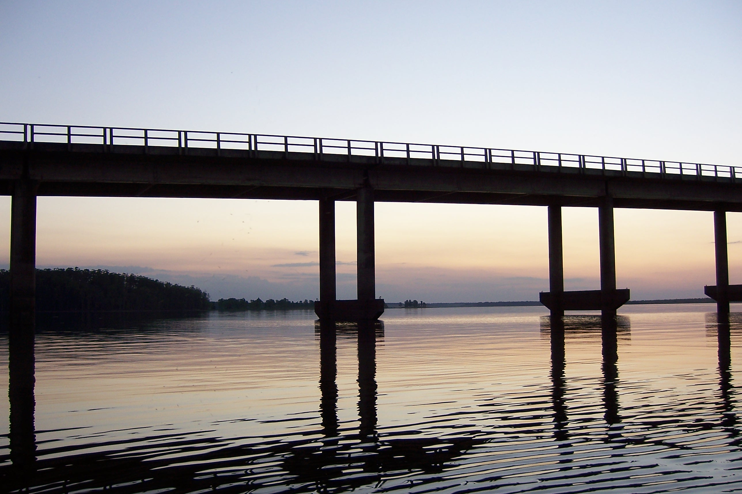 Río Negro, Uruguay, en el lugar denominado Paso del Puerto. En la foto se aprecia el nuevo puente de la Ruta Nacional N° 3, que sustituye al antiguo puente en arco y actualmente sumergido por el embalse de la Represa de Palmar.